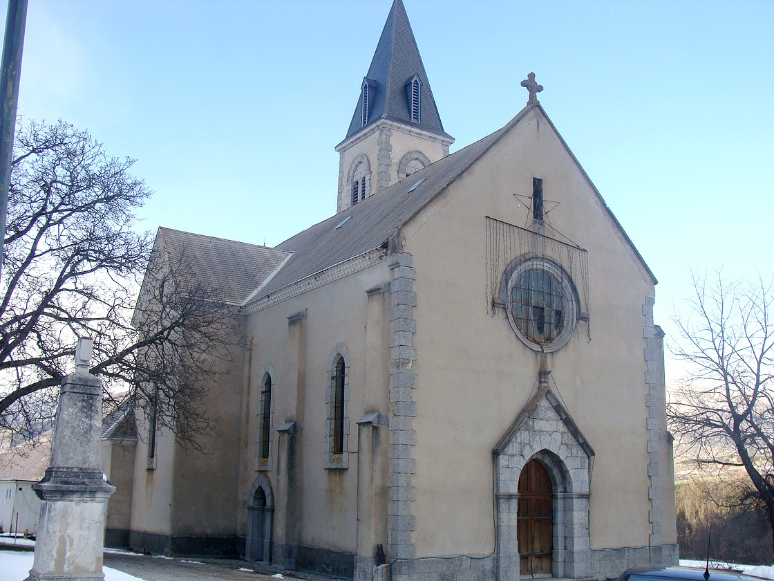 L'église de Manteyer, vue d'ensemble.